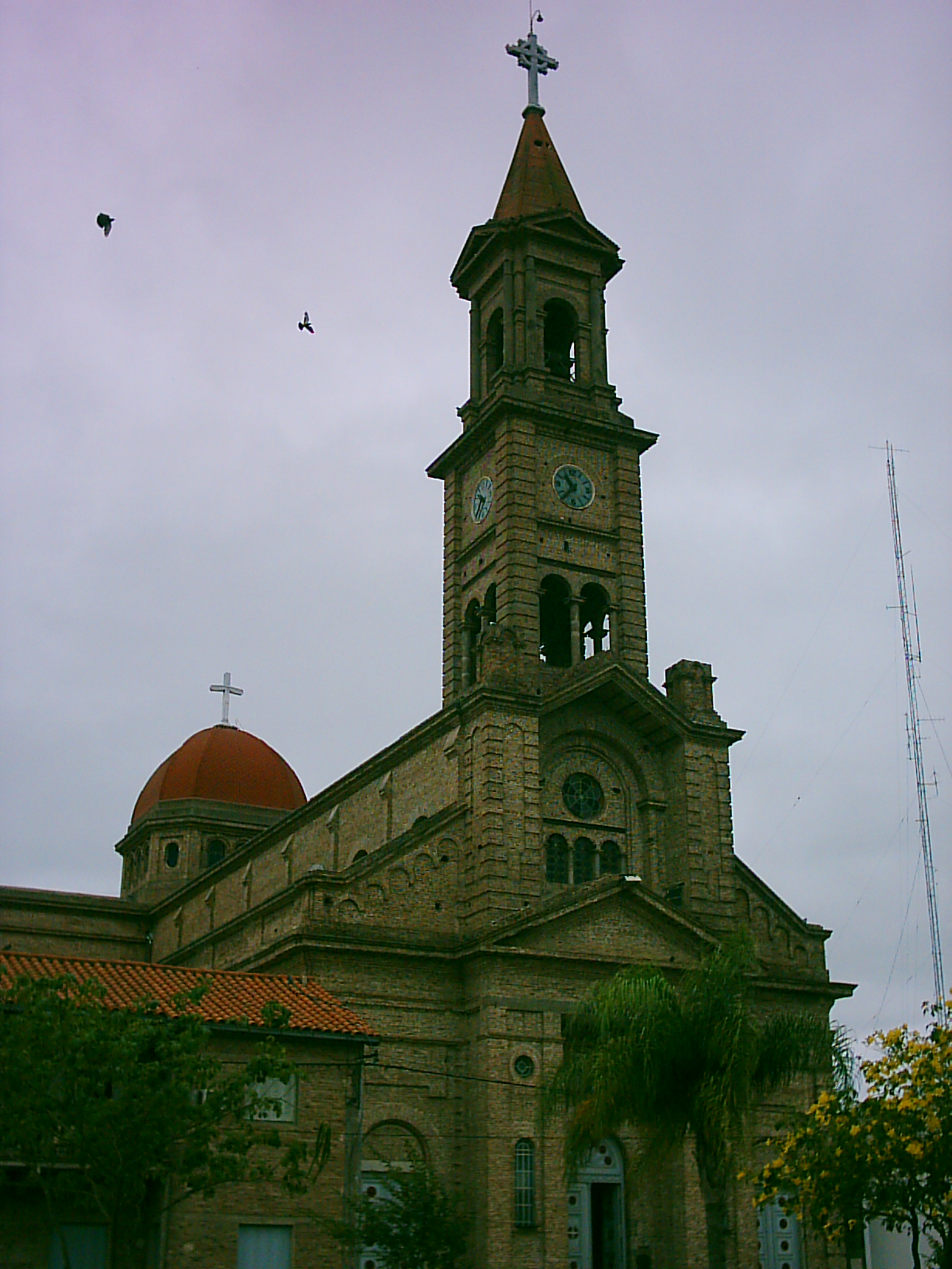 Catedral de la ciudad de Reconquista, en la provincia de Santa Fe, Argentina.